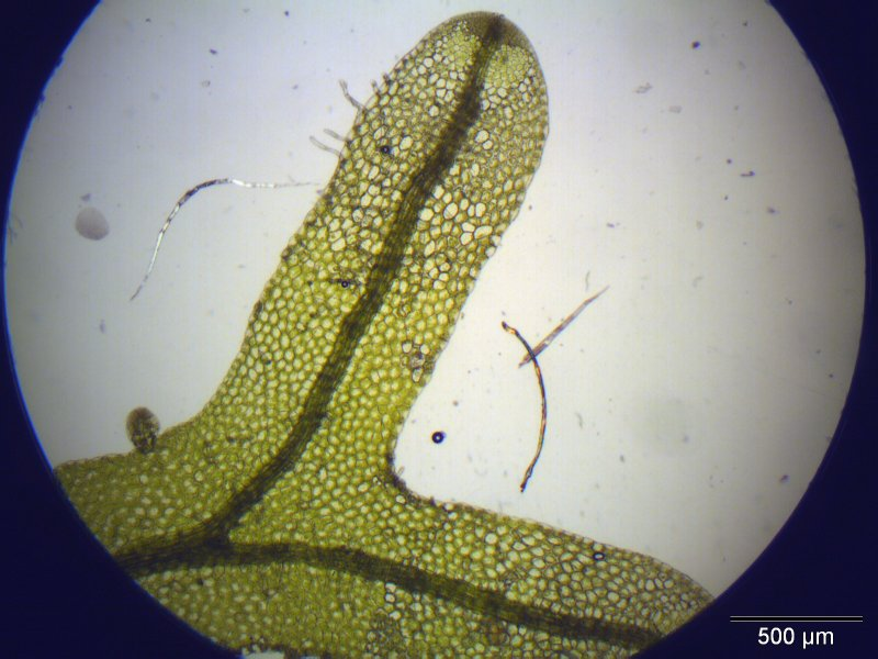 Gewöhnliches Igelhaubenmoos (Metzgeria furcata), Thallus (Vergrößerung: 40x)